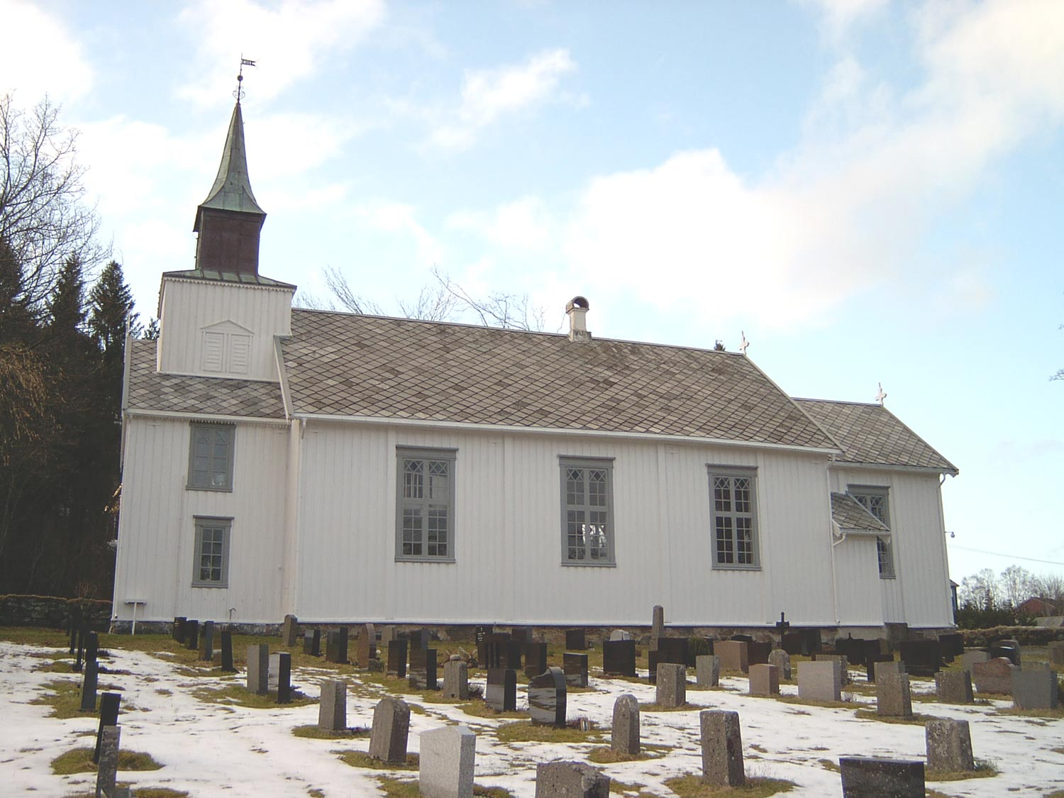 Eide kirke in Eide, Møre og Romsdal. Norway.